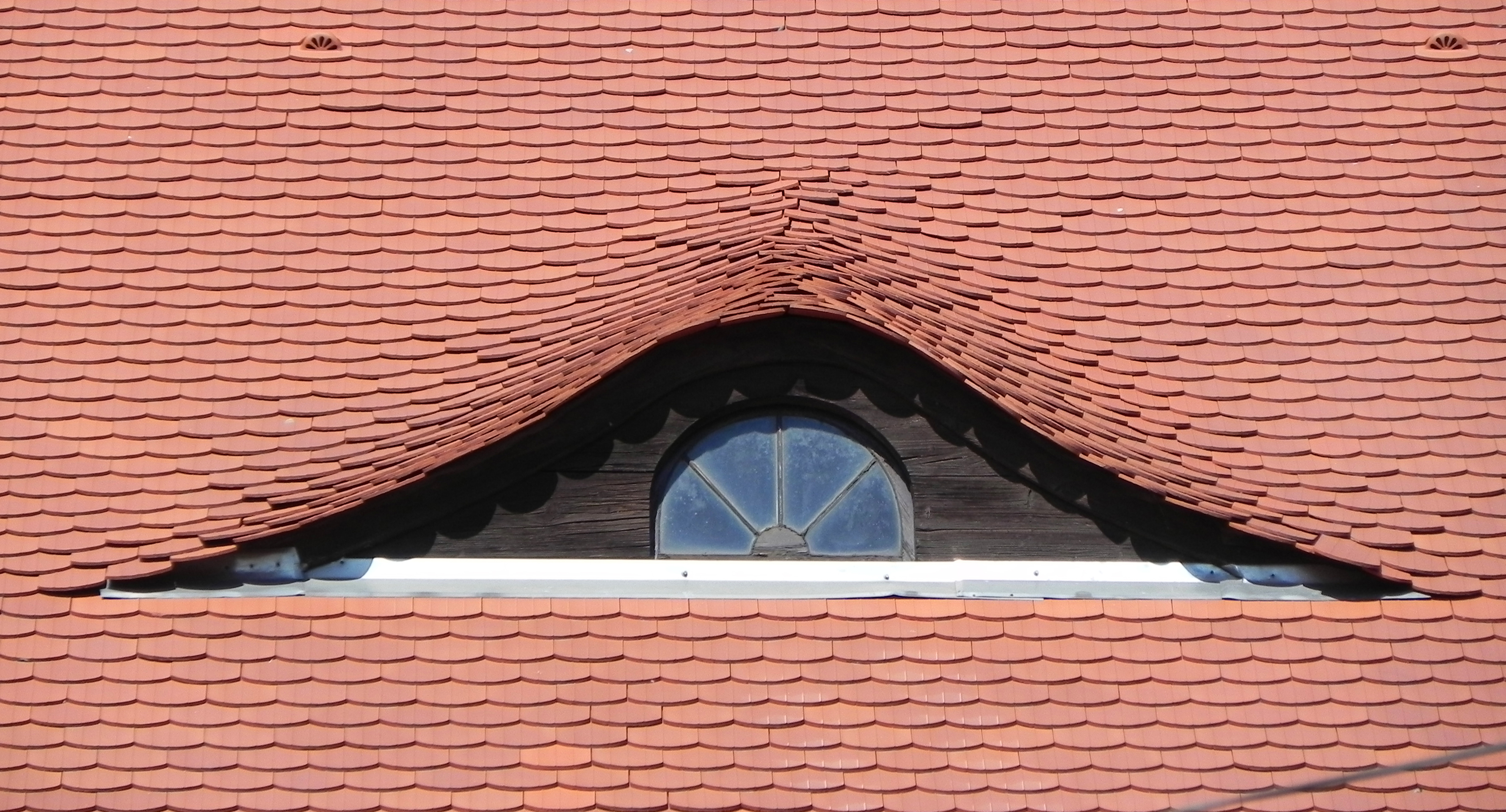 Bystrzyca Kłodzka, kościół par. p.w. św. Michała Archanioła, kon. XIII, XV, 1914